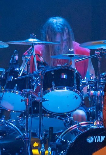 Tom Hunting, drummer of Exodus, on the Barge to Hell, Dec. 2012